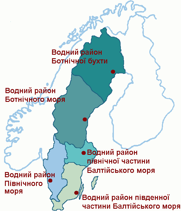 Водні райони Швеції. Створено на основі карти Sweden´s five water authorities у статті Organization на сайті Vattenmyndigheterna.